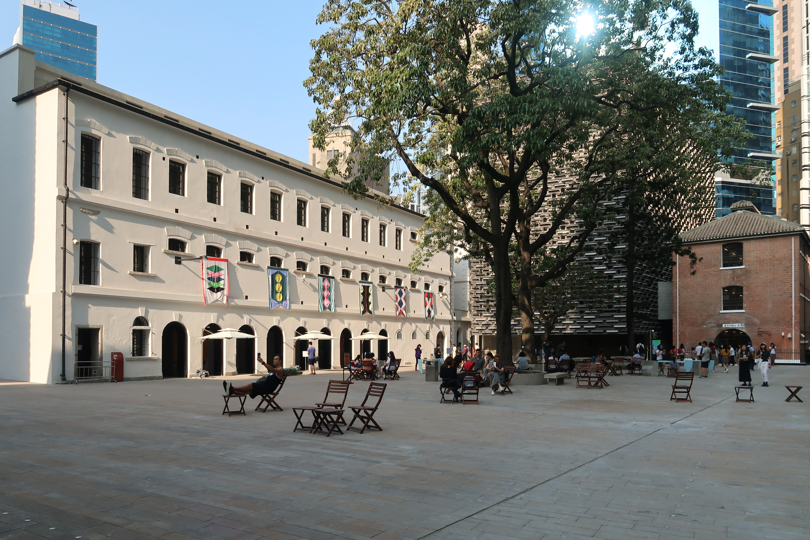 Tai Kwun Prison Yard